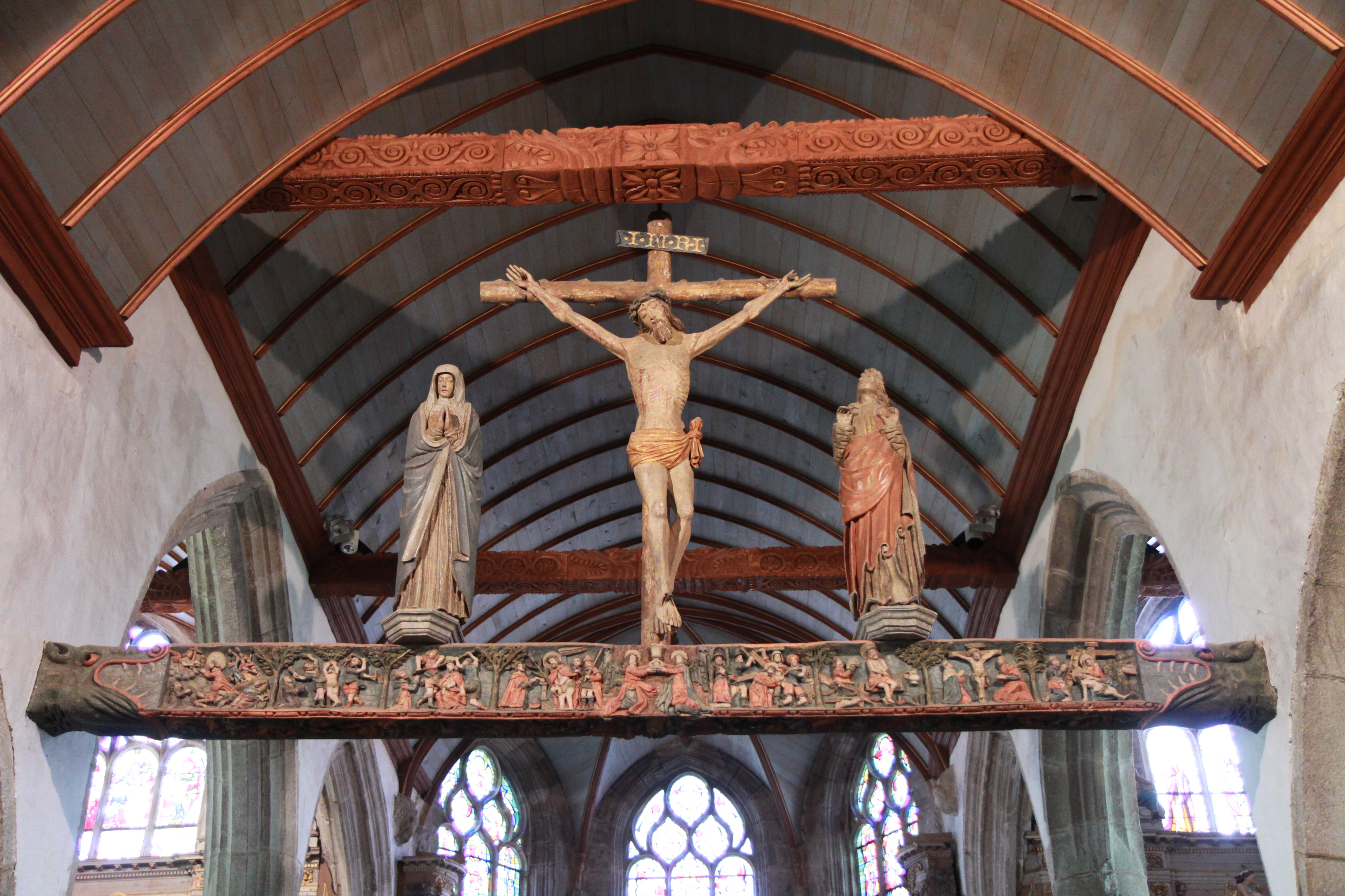 Vue de l'enclos paroissial de Lampaul-Guimiliau. La poutre de gloire.